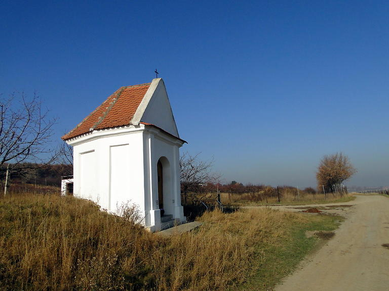 Kaplička sv. Anny (Dětkovice), J od obce u polní cesty, Dětkovice